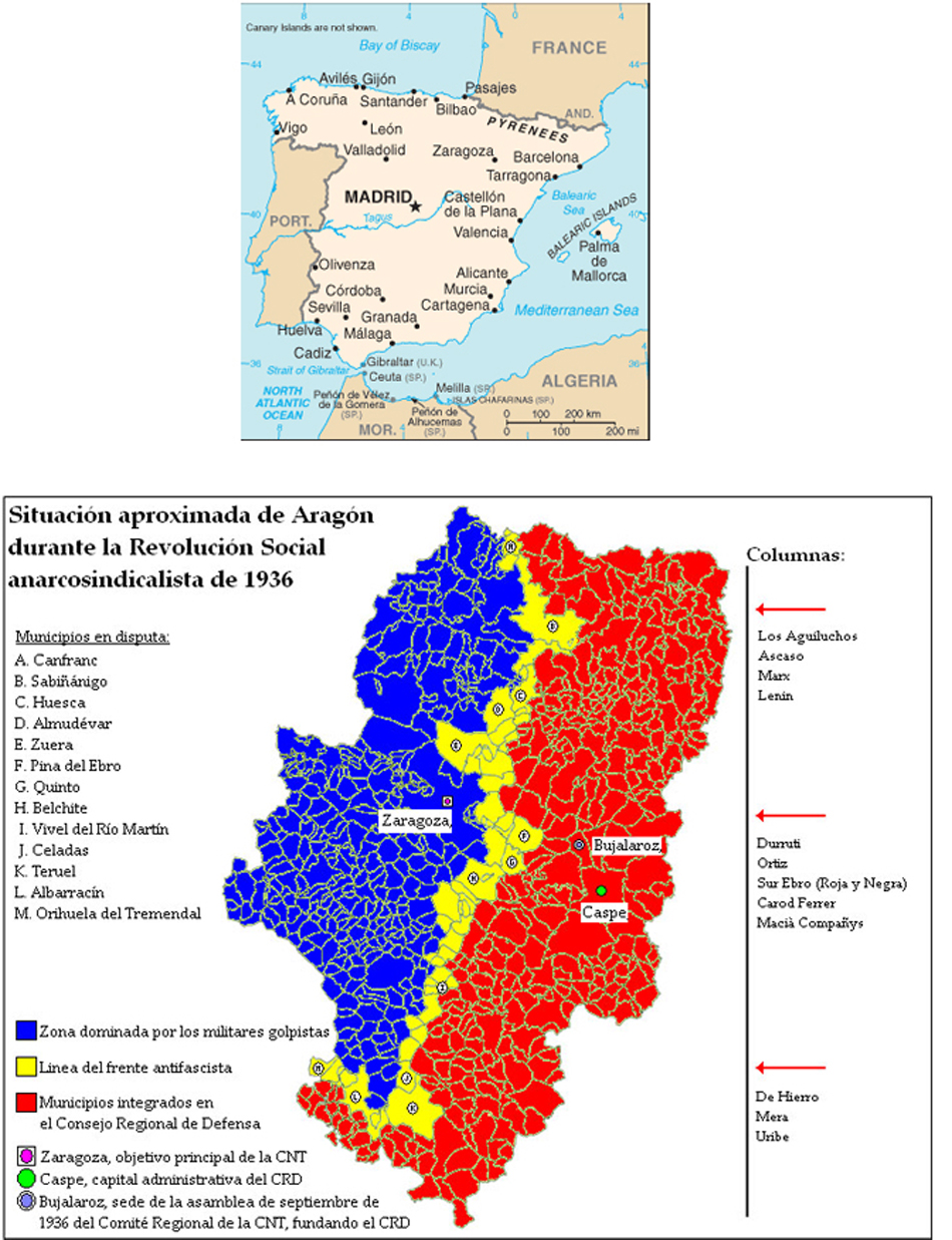 Due mappe assieme con scritte eplicative; quella di sopra è di confronto con tutta la penisola iberica quella di sotto specifica il fronte con l'esercito franchista e le formazioni anarchiche contrapposte. L'anarchico Antonio Cieri (con Guido Picelli, anche lui caduto in Spagna, guidava gli Arditi del Popolo a Parma, dove gli squadristi fascisti di Italo Balbo furono sconfitti) cadde ad Huesca al comando della sua squadra di assaltatori.